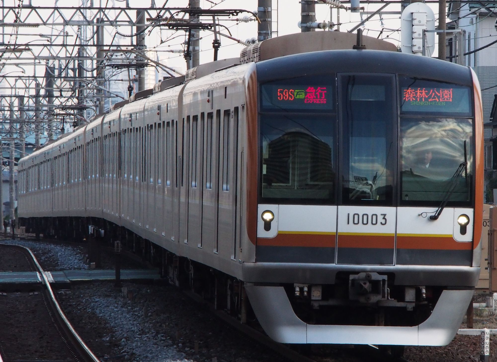 2016年3月26日より運転を開始した副都心線直通の急行「Fライナー」。渋谷以南の東急東横線・みなとみらい線内では、「F特急」に変更される。（川越）